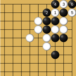 Seconde étape du ko à étages au jeu de go